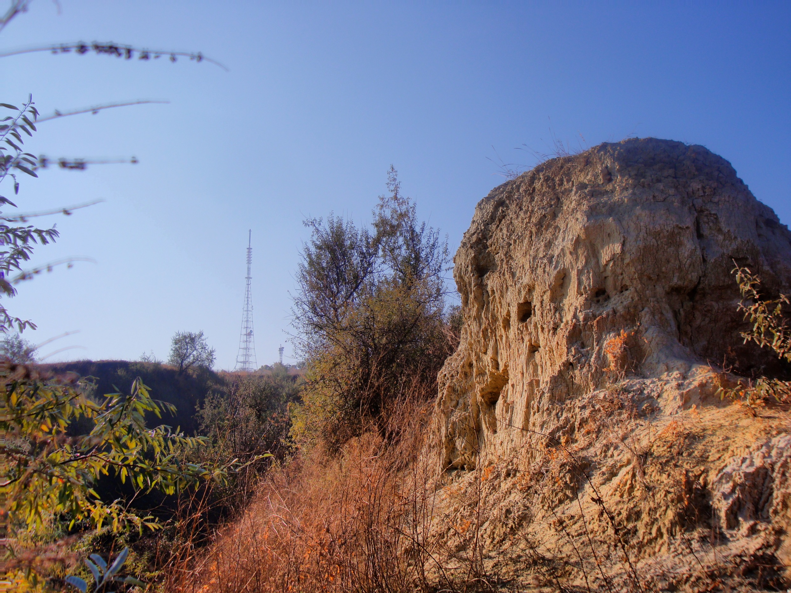 Râpele de la Cimișlia